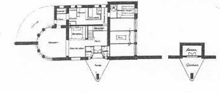 Detalle.